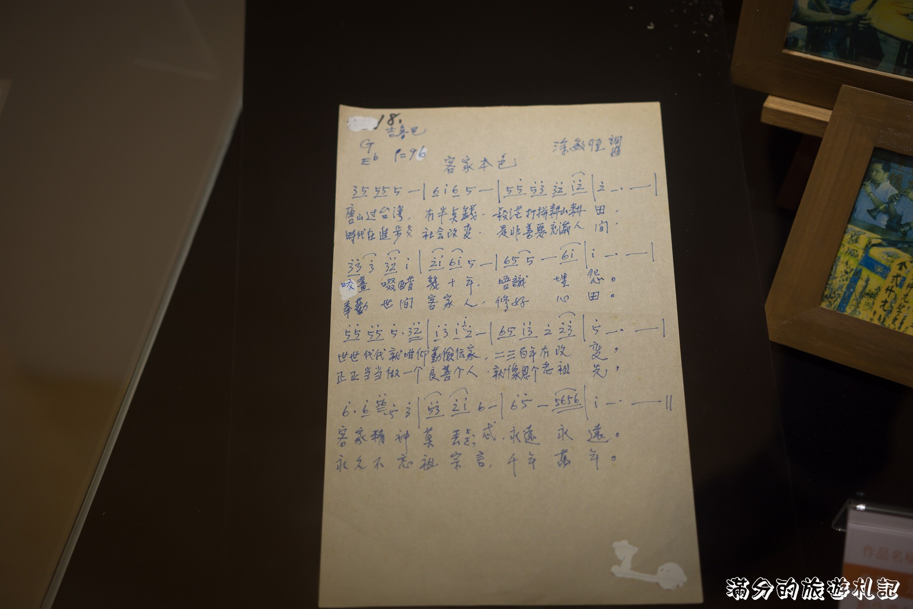 桃園市客家文化館，涂敏恆作詞作曲《客家本色》簡譜手稿。